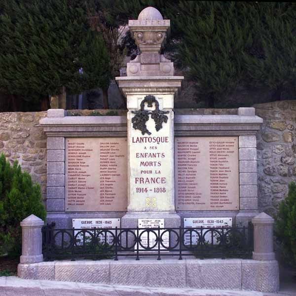 Monument aux mort de Lantosque